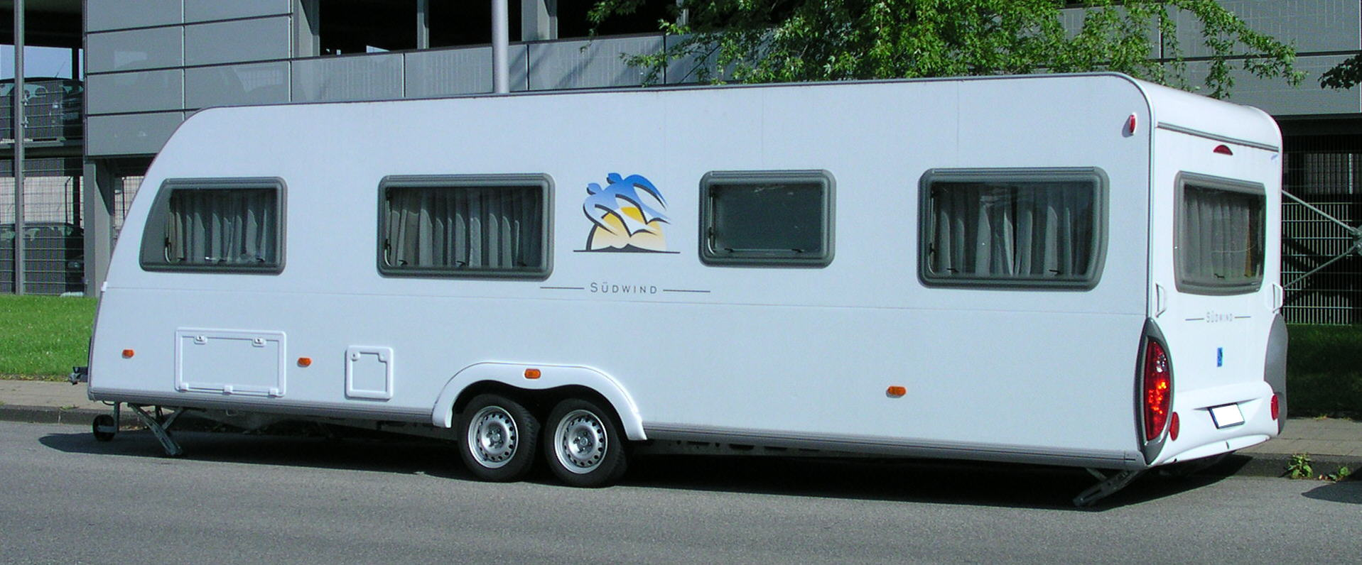 langer Wohnwagen des Herstellers Knaus, Modellreihe “Südwind”